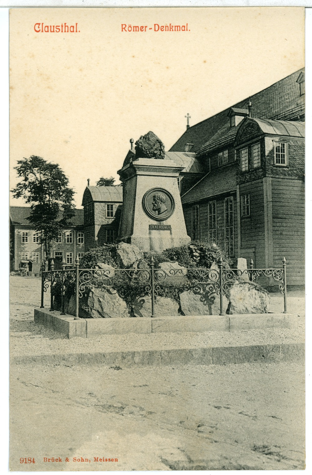 Clausthal; Römerdenkmal This postcard is from publisher Brück & Sohn in Meißen ( postcard has a unique number 09184 and is available in a higher resolution at the publisher. This images was uploaded in a cooperation project between Wikipedians and the publisher.